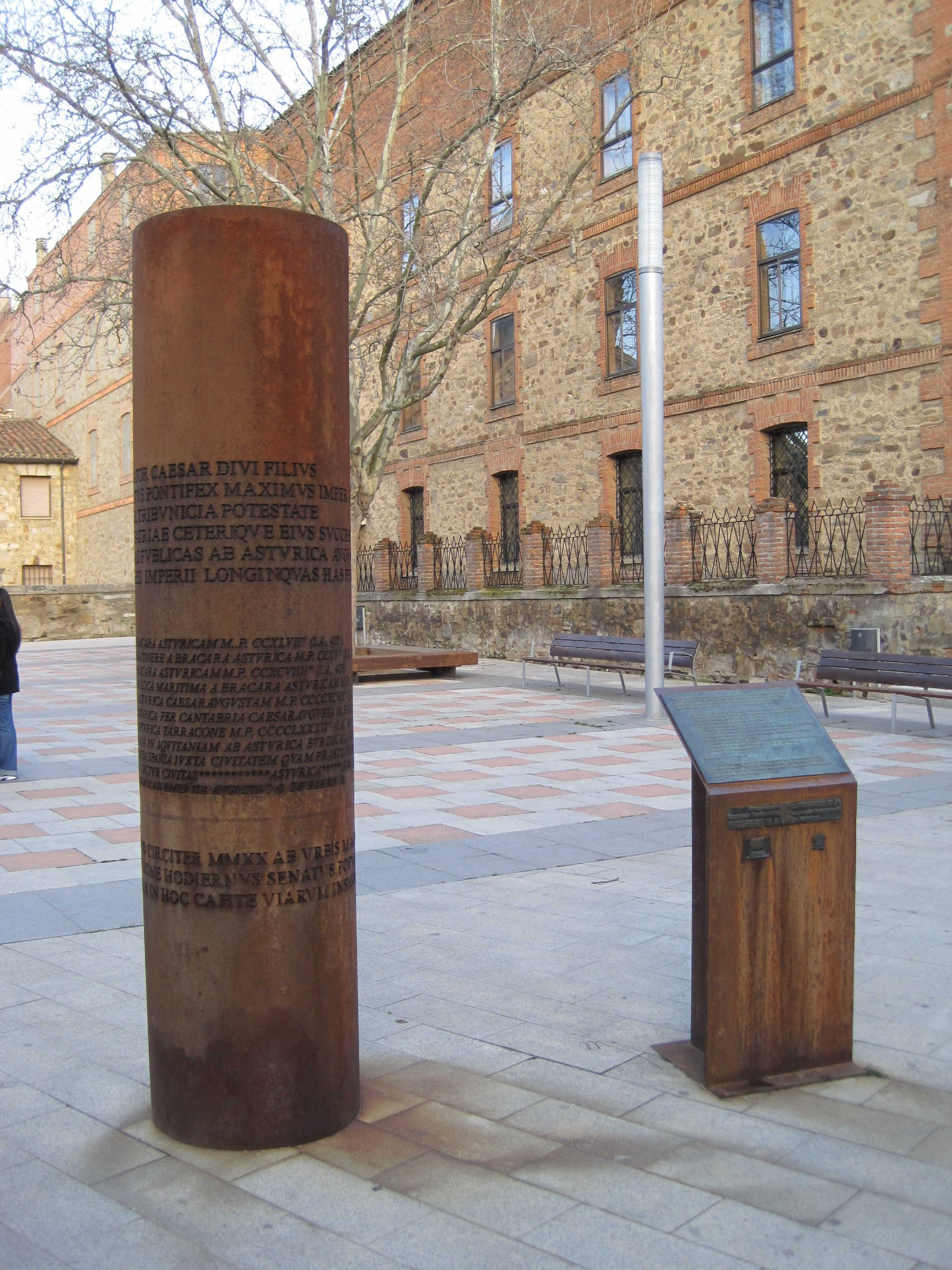 Miliario conmemorativo en recuerdo de las calzadas romanas que cruzaban Asturica Augusta (Astorga, León, España).